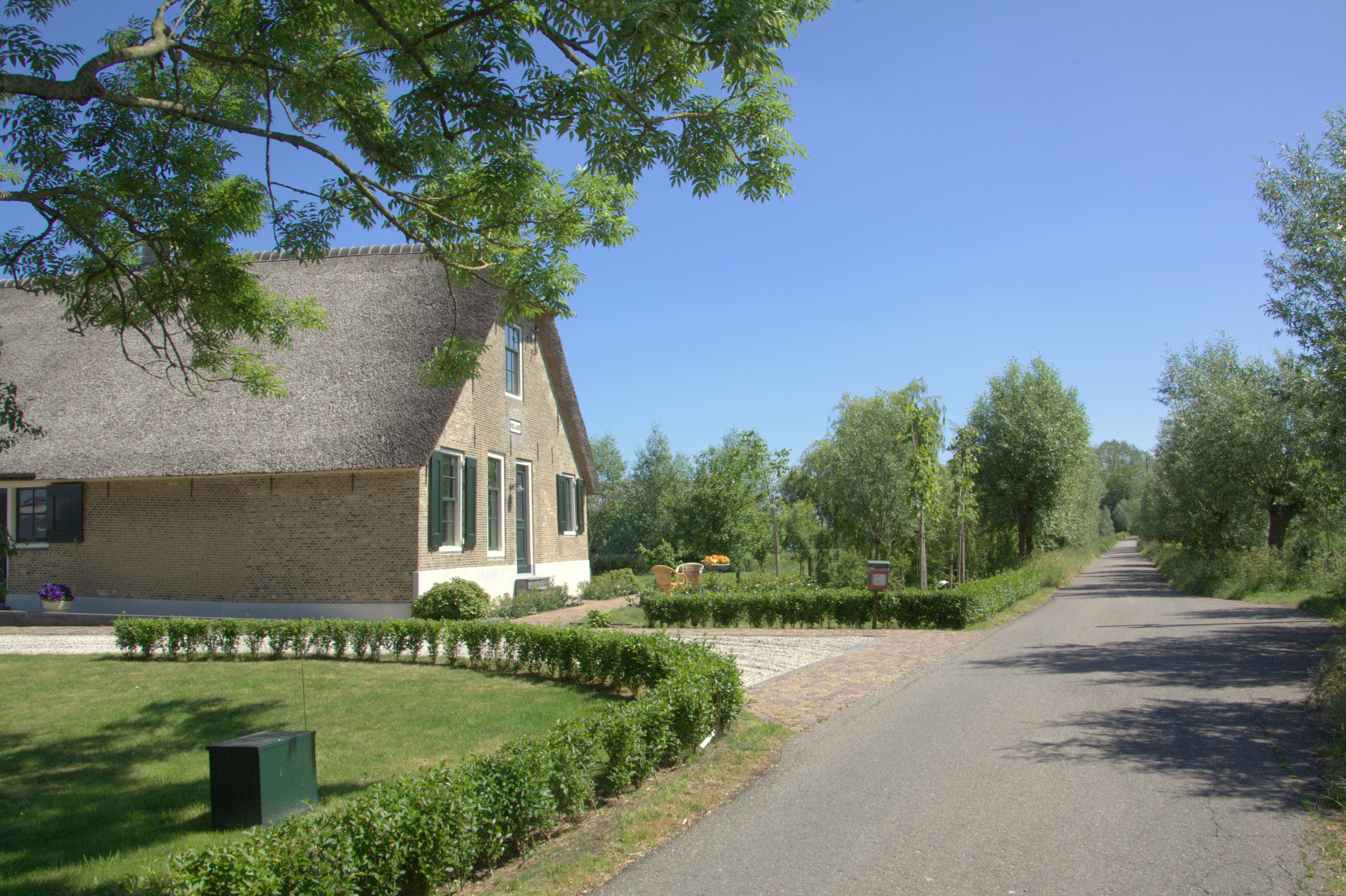 Boerderij Werk en Wacht in het buurtschap Bovenkerk bij de plaats Stolwijk in gemeente Krimpenerwaard. De boerderij is een rijksmonument.